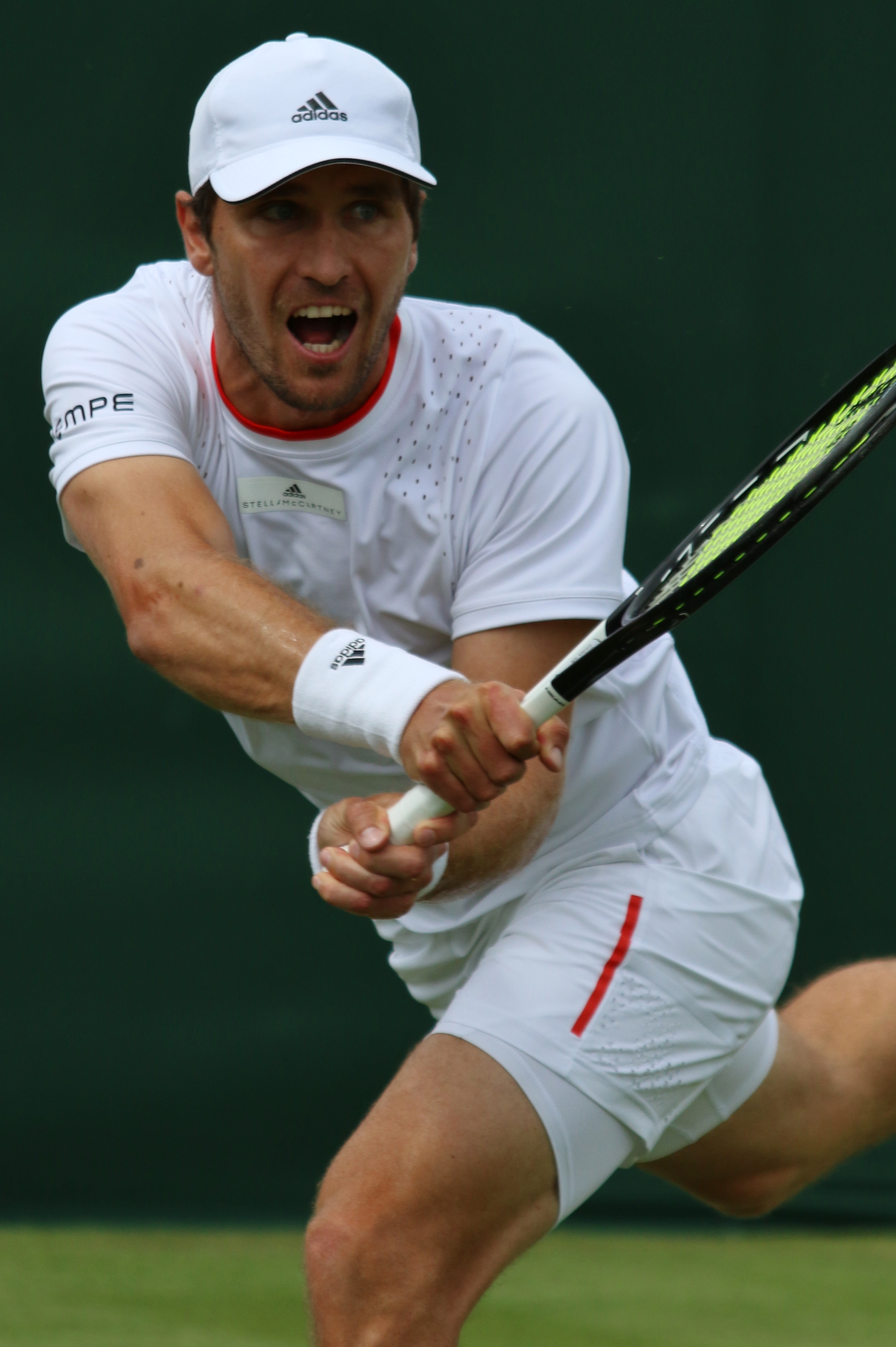 Zverev M. WM19 (7)